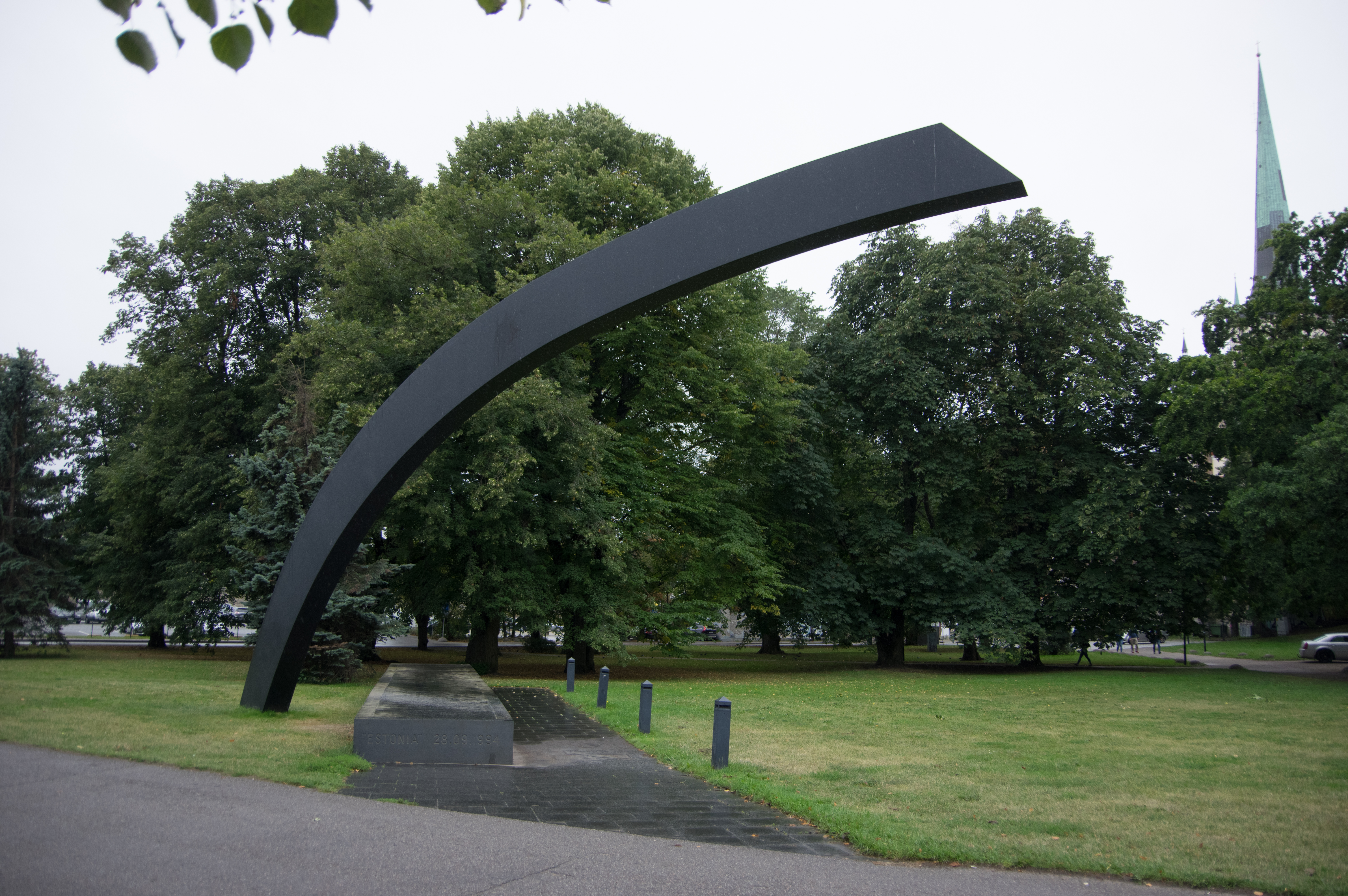 Tallinn in Estland. Das Denkmal erinnert an die gestorbenen Menschen bei dem Schiffsunglück des Schiffes Estonia am 28. September 1994. Dabei starben 852 Menschen.